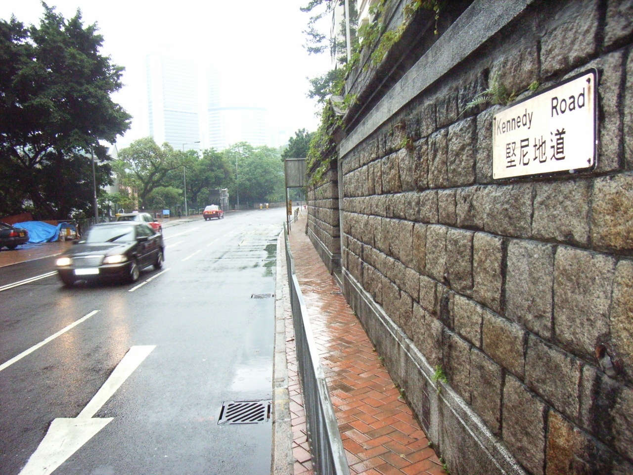 堅尼地道 (英文名字: Kennedy Road) AlbertCotton